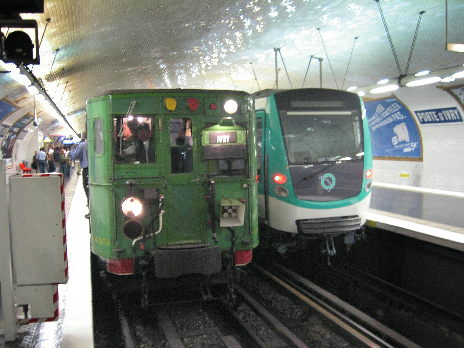 Journées du patrimoine RATP 16-17/09/2006. 100 ans de métro de Paris: Un Sprague-Thomson (1907) à coté d'un MF 2000. fr links: Sprague-Thomson and MF 2000